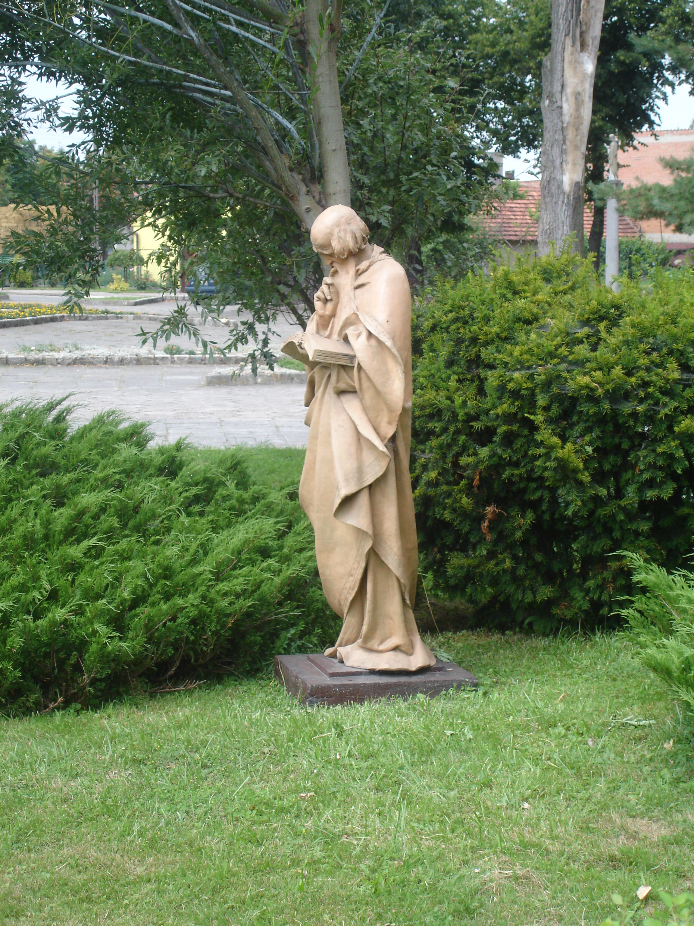 Figura świetego Mateusza w Pawłowicach